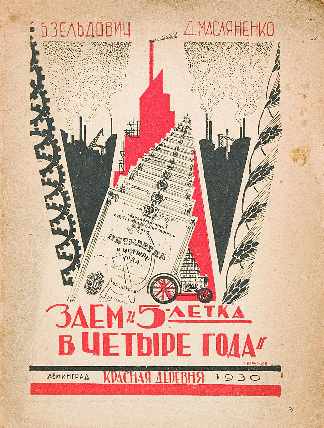 Обложка книги Д. А. Масляненко и Б. Зельдовича «Заем. Пятилетка в четыре года в вопросах и ответах»